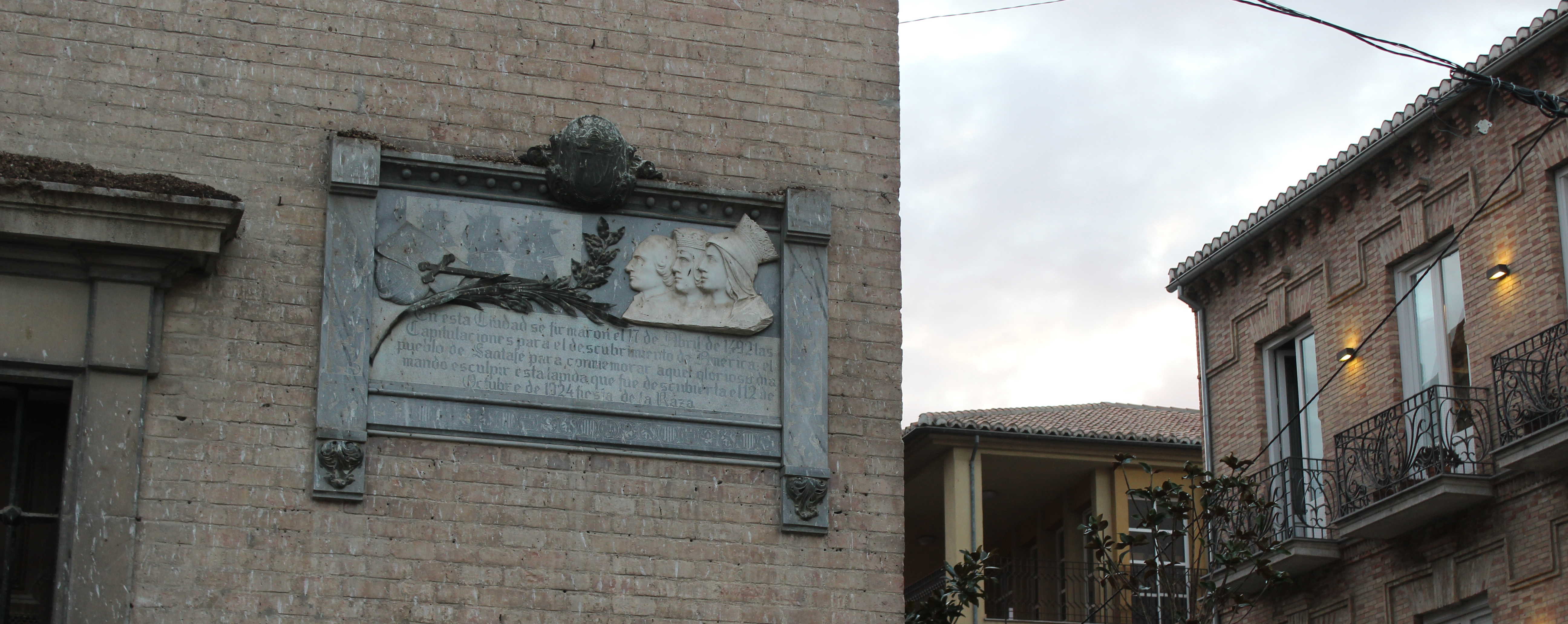 Detalle de la fachada de la iglesia de la Encarnación en Santa Fe (Granada).